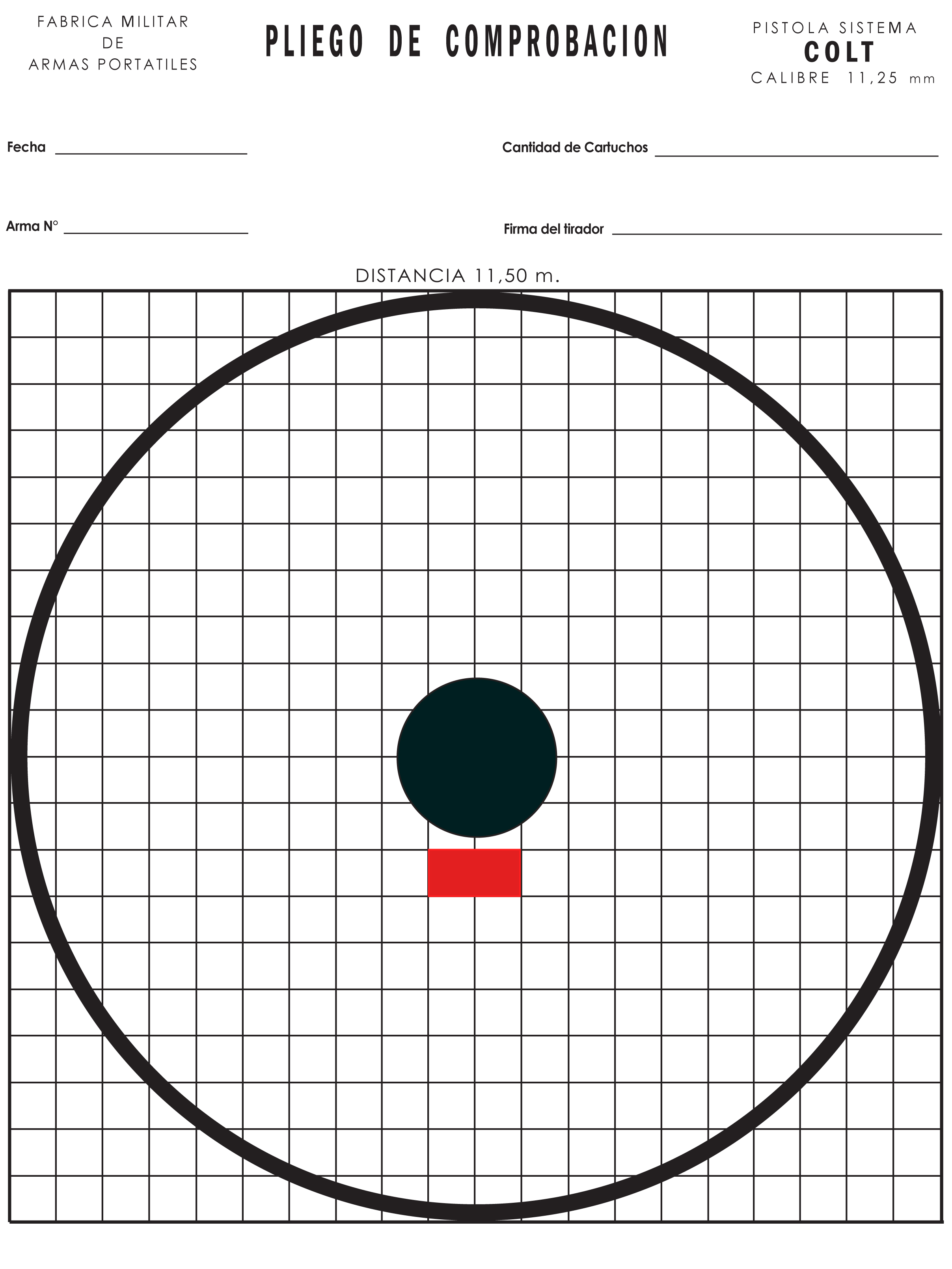 pliego de comprobación utilizado para probar la precisión de la pistola Sistema Colt modelo 1927, por la Fabrica Militar de Armas Portatiles "Domingo Matheu". Argentina.